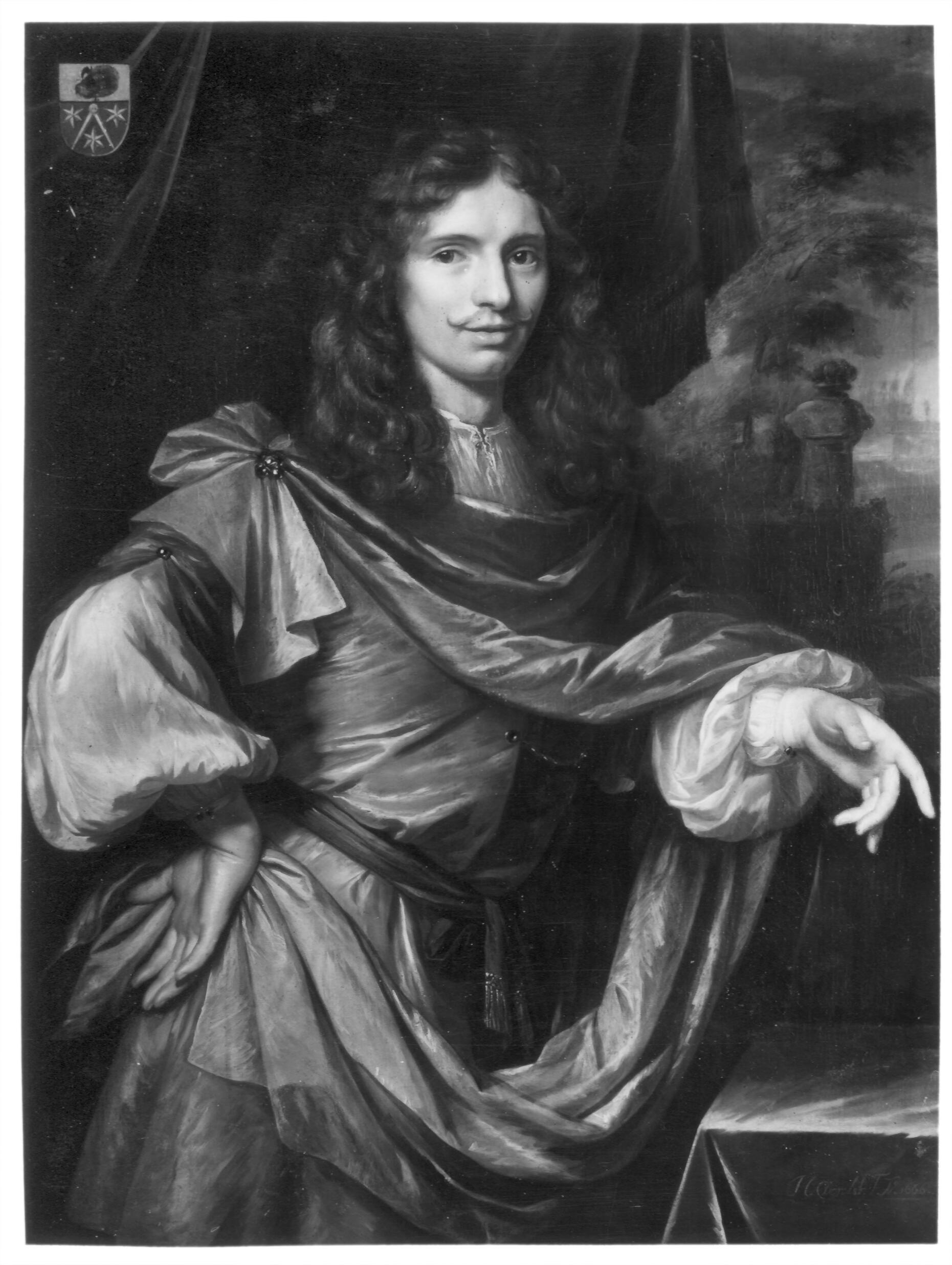 Portret van de Amsterdamse regent Cornelis Calkoen (1639-1710)